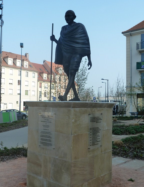 வொரெயால் நகர காந்தி சிலை